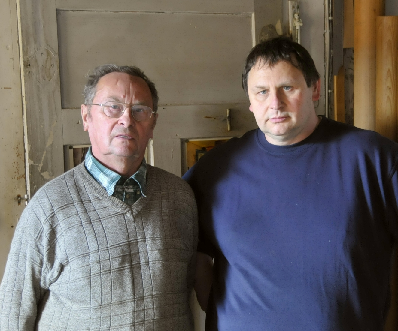 Vater Karl-Heinz und Sohn Dirk Schönefeld am 21.03.2014